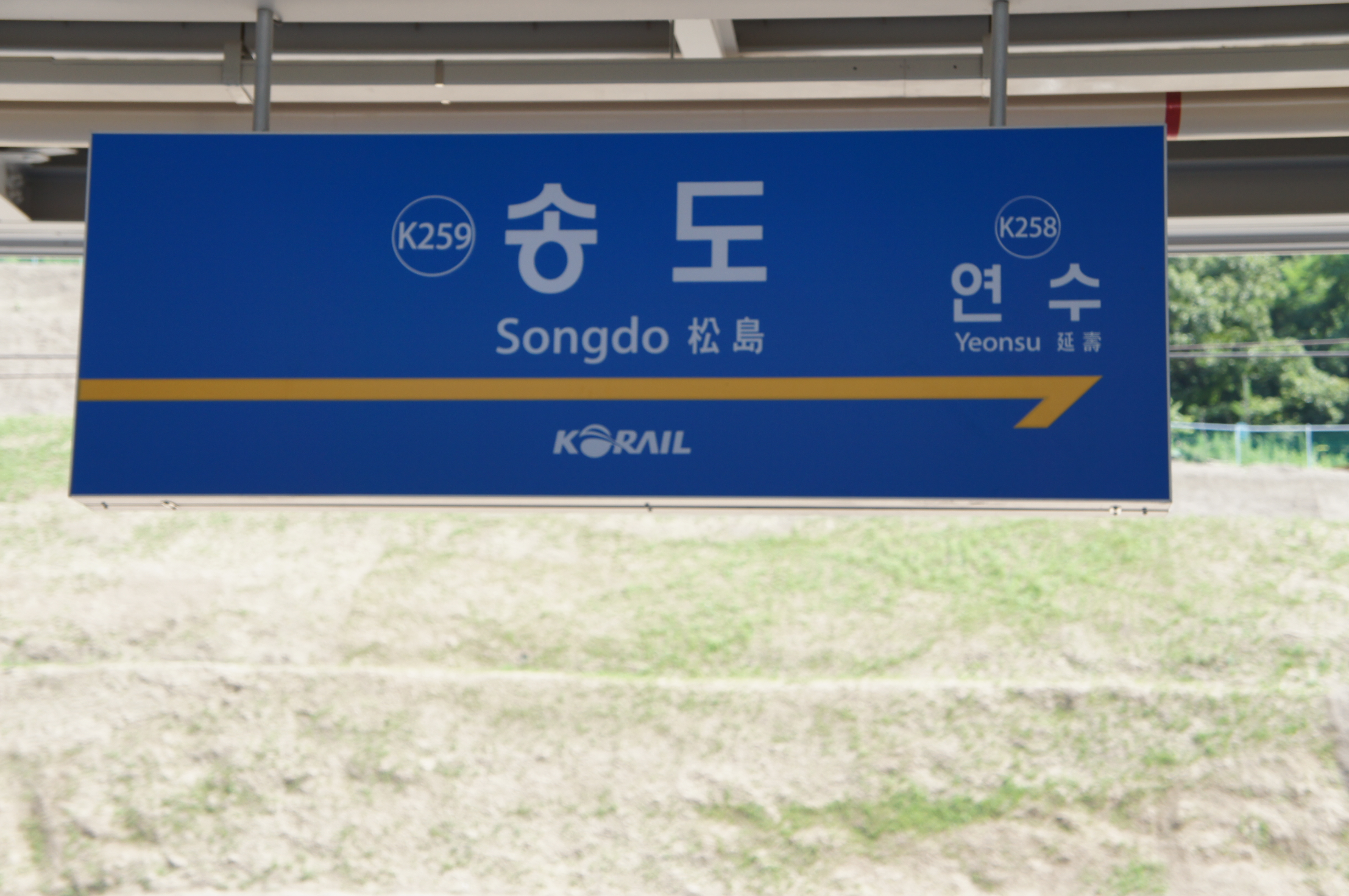 송도역 역명판